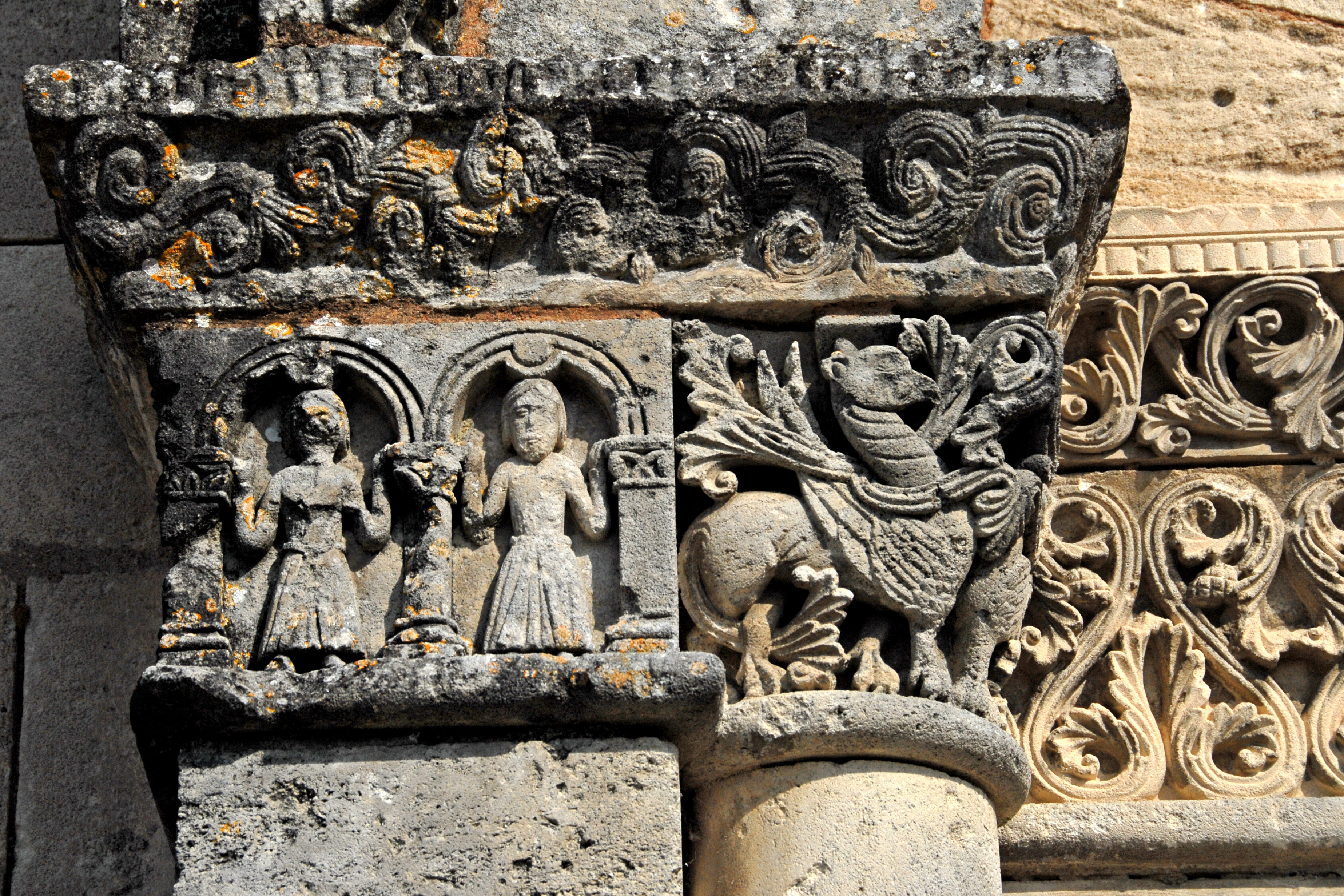 Genzac-la-Pallue, Kapitell u. Kapitellband, linkes Scheinportal, limks